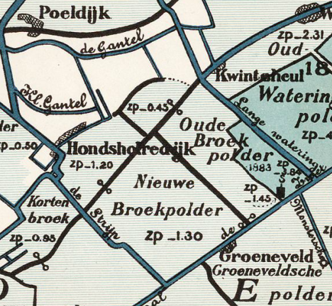 Oude_en_Nieuwe_Broekpolder